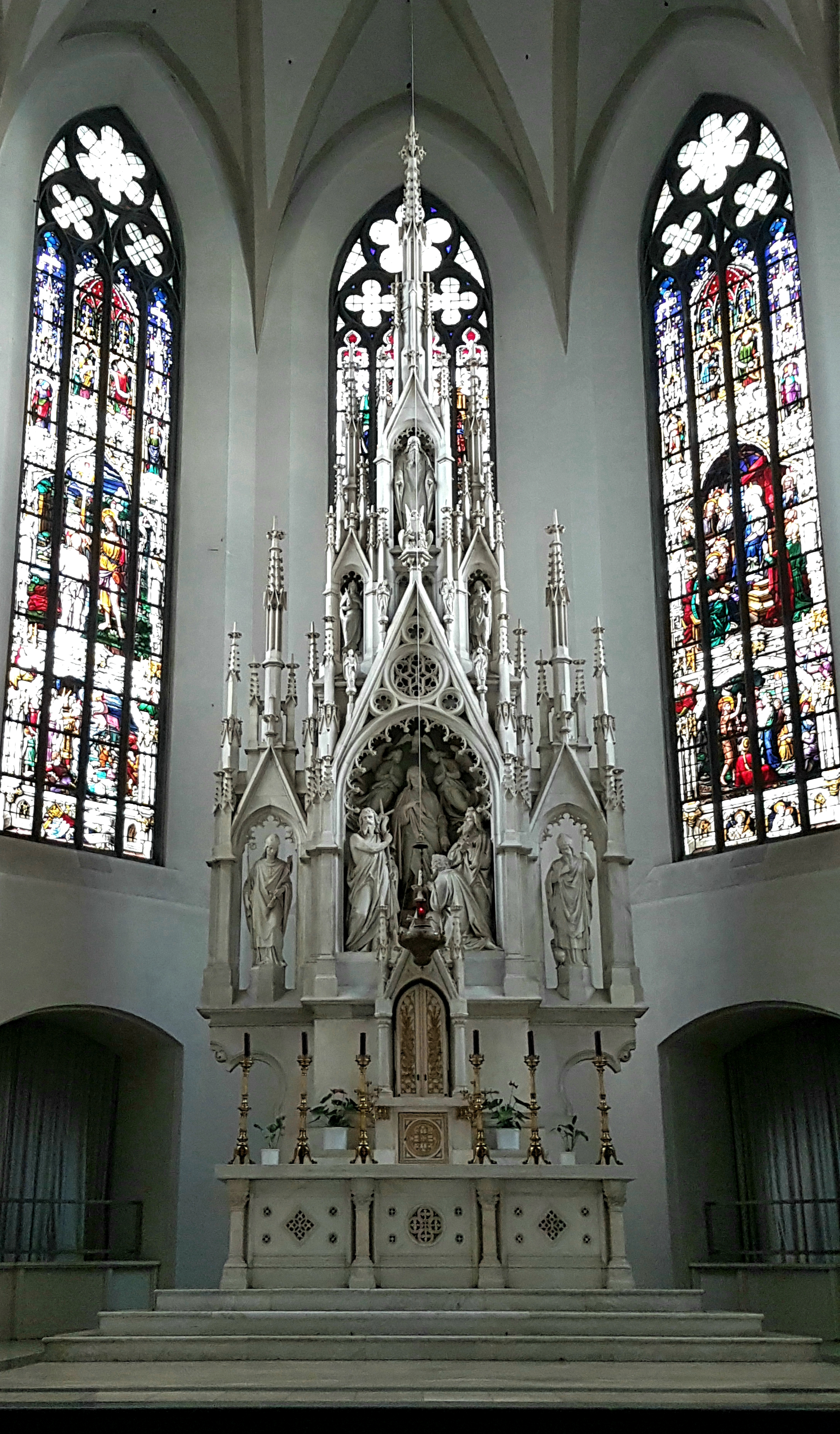 München, Neue Pfarrkirche St. Johann Baptist (Haidhausen), Hochaltar (1860) von Josef Knabl nach Entwurf v. M. Berger.